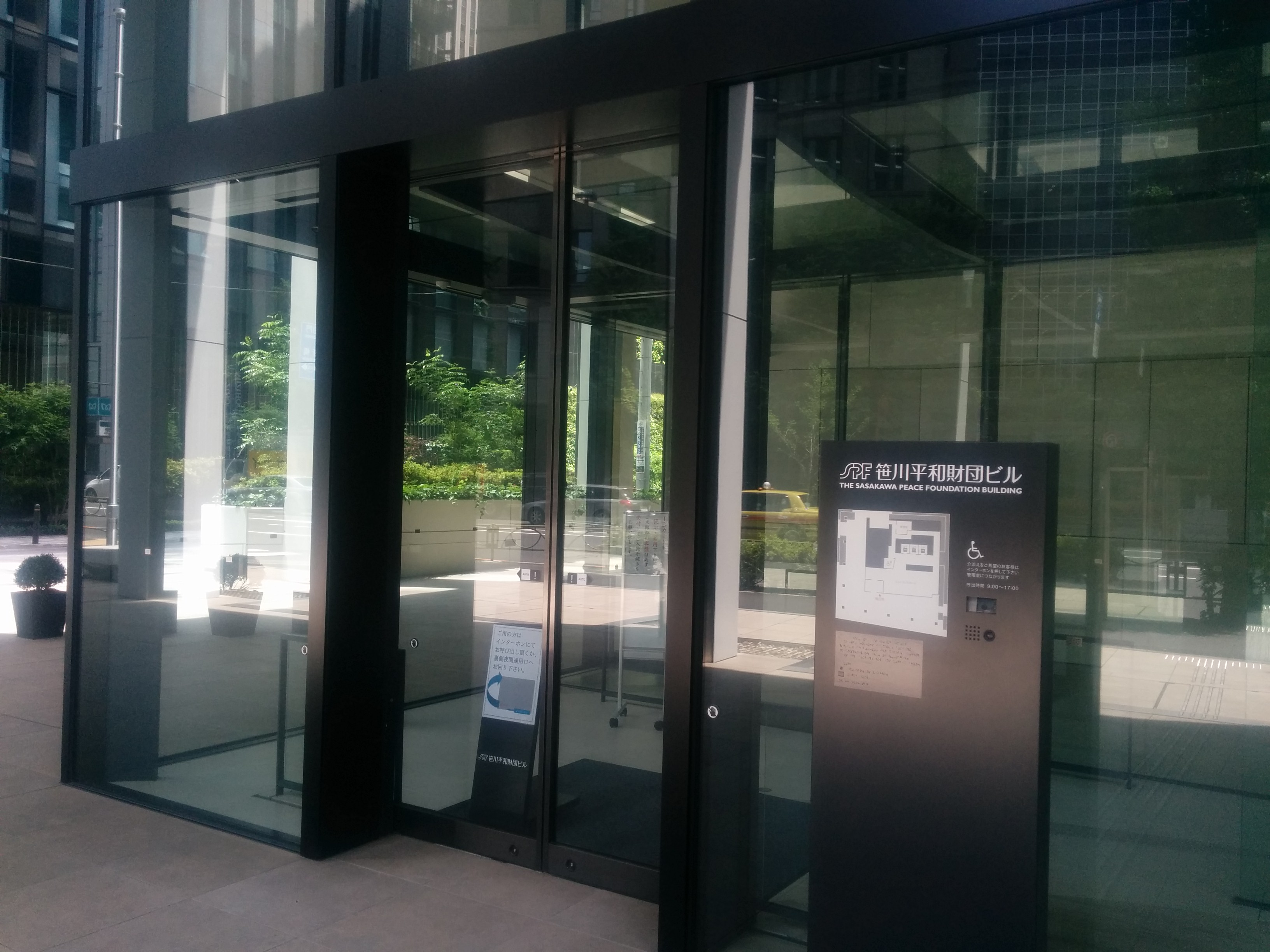 笹川平和財団